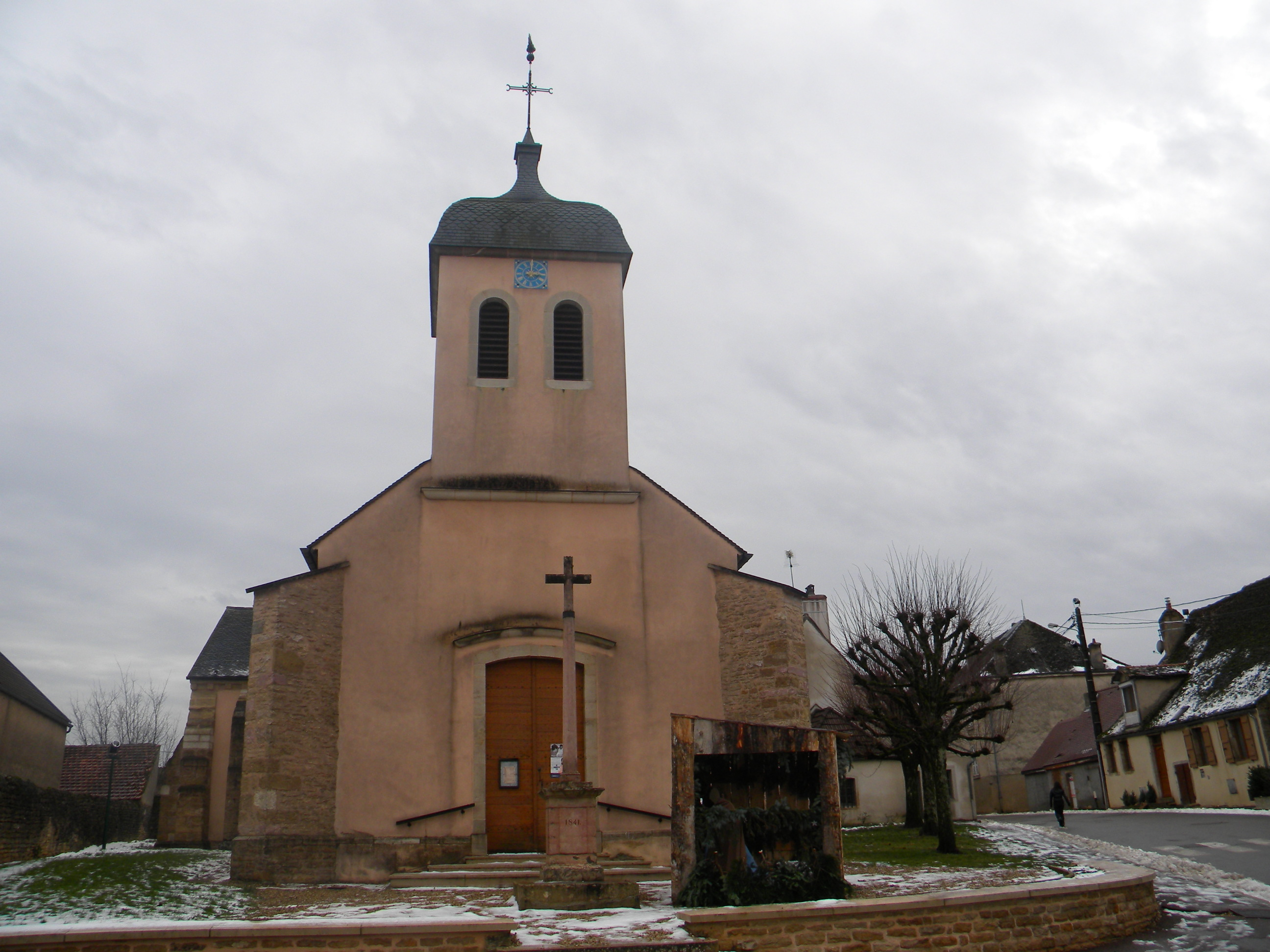 Eglise de Chorey-les-Beaune